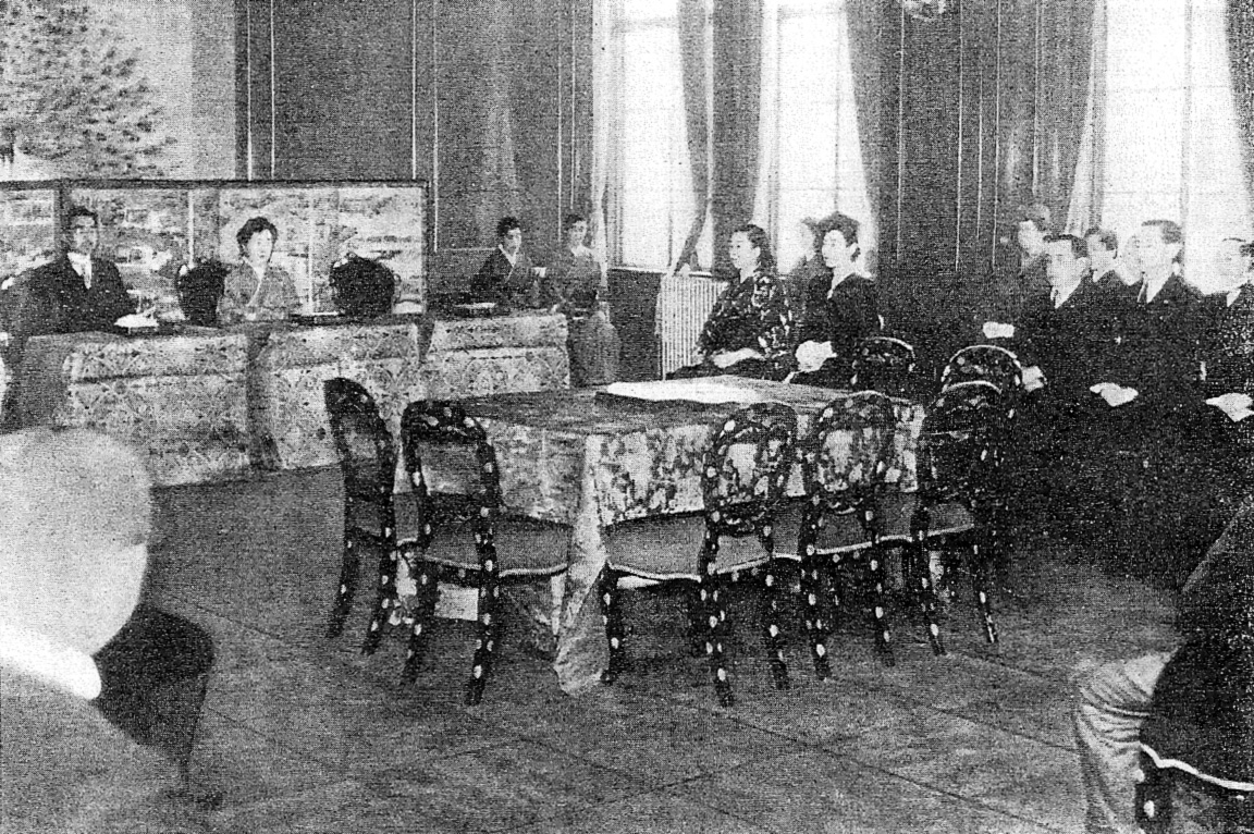 1950年頃の、宮中歌会始の様子